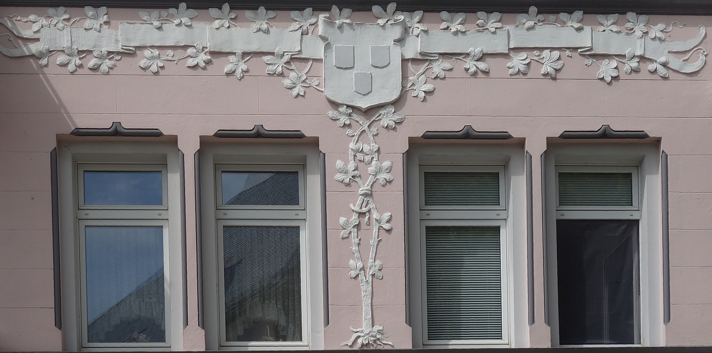 Florale Jugendstilelemente an einer Fassade in Wuppertal-Vohwinkel